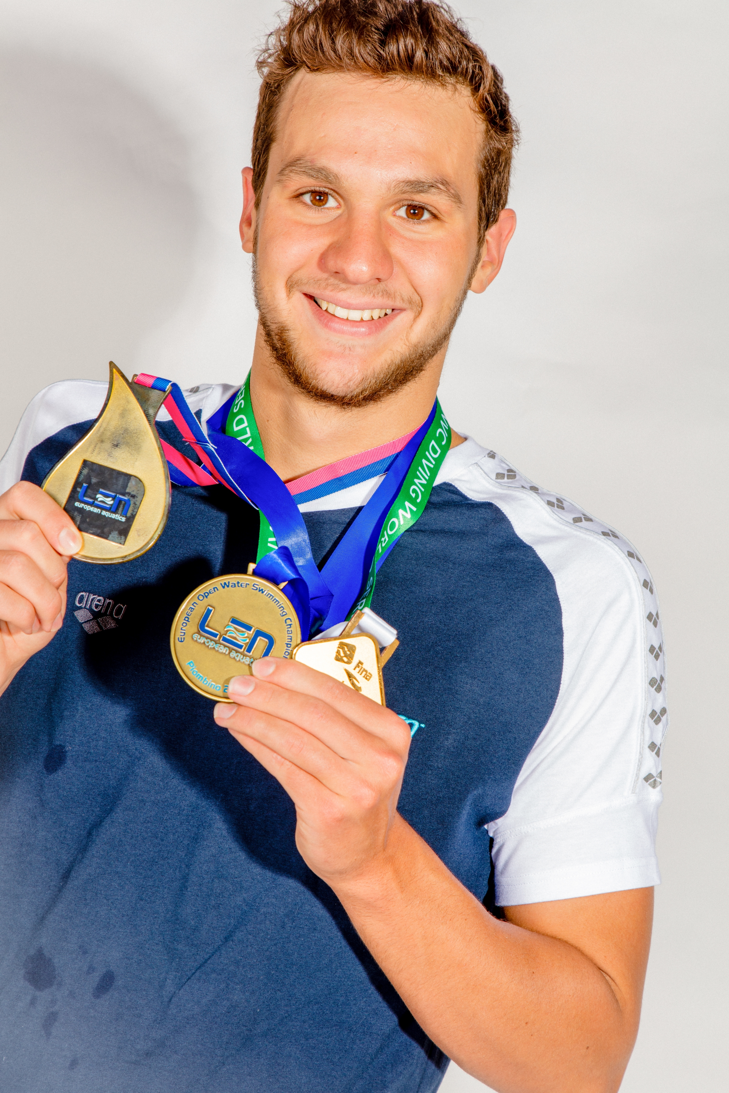 Axel Reymond - Médaillé (Médaille de champion d'Europe du 25 km en eau-libre, Médaille de Coupe du Monde de Natation Marathon, ...)